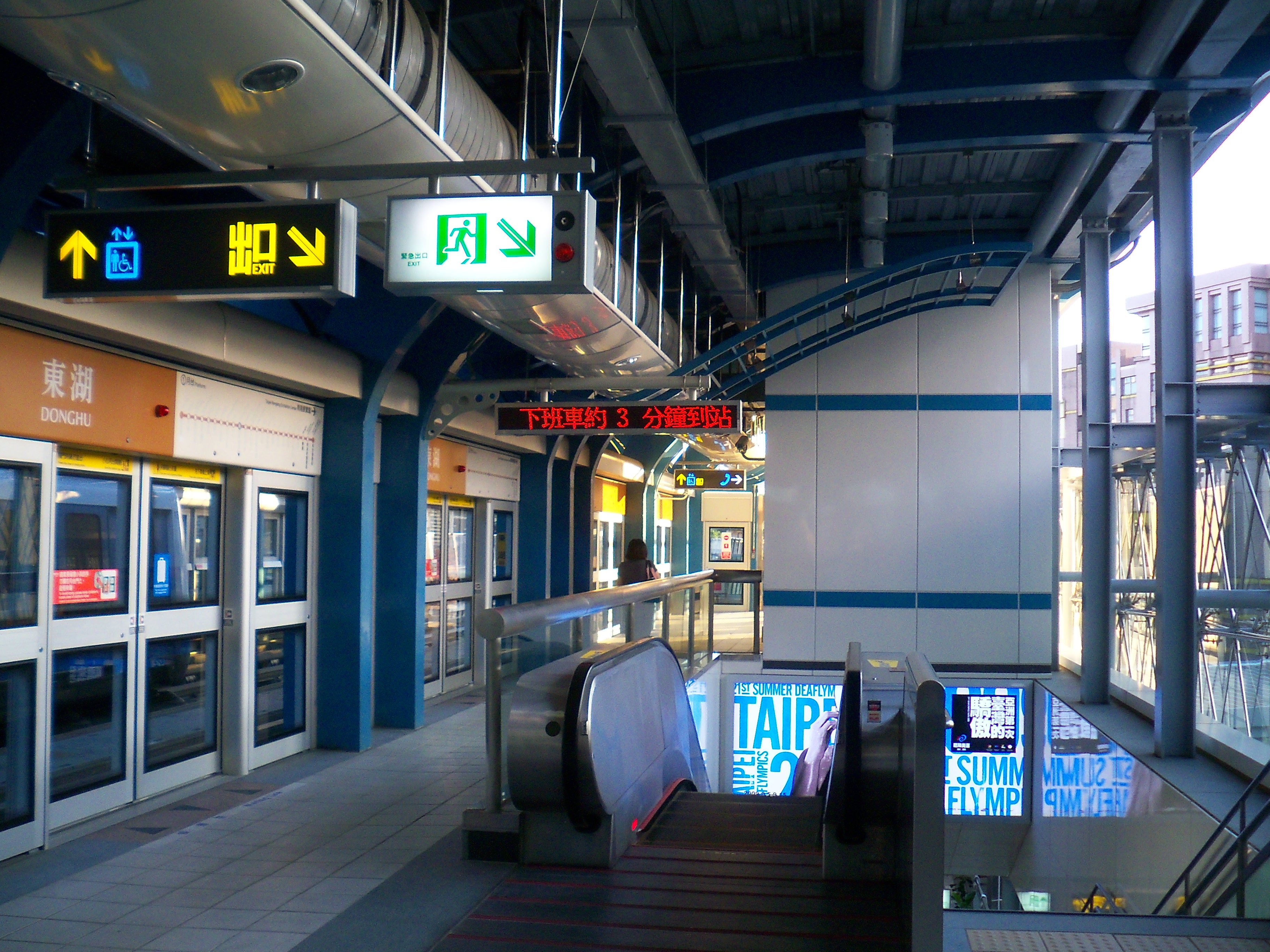 台北捷運内湖線東湖駅ホーム。